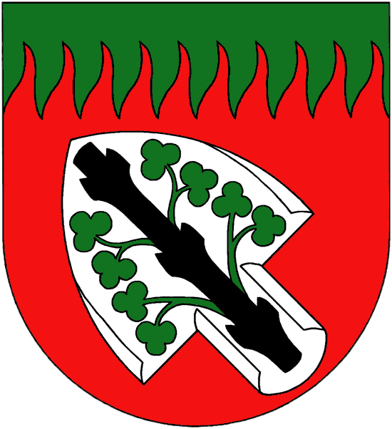 Znak obce Pluhův Žďár